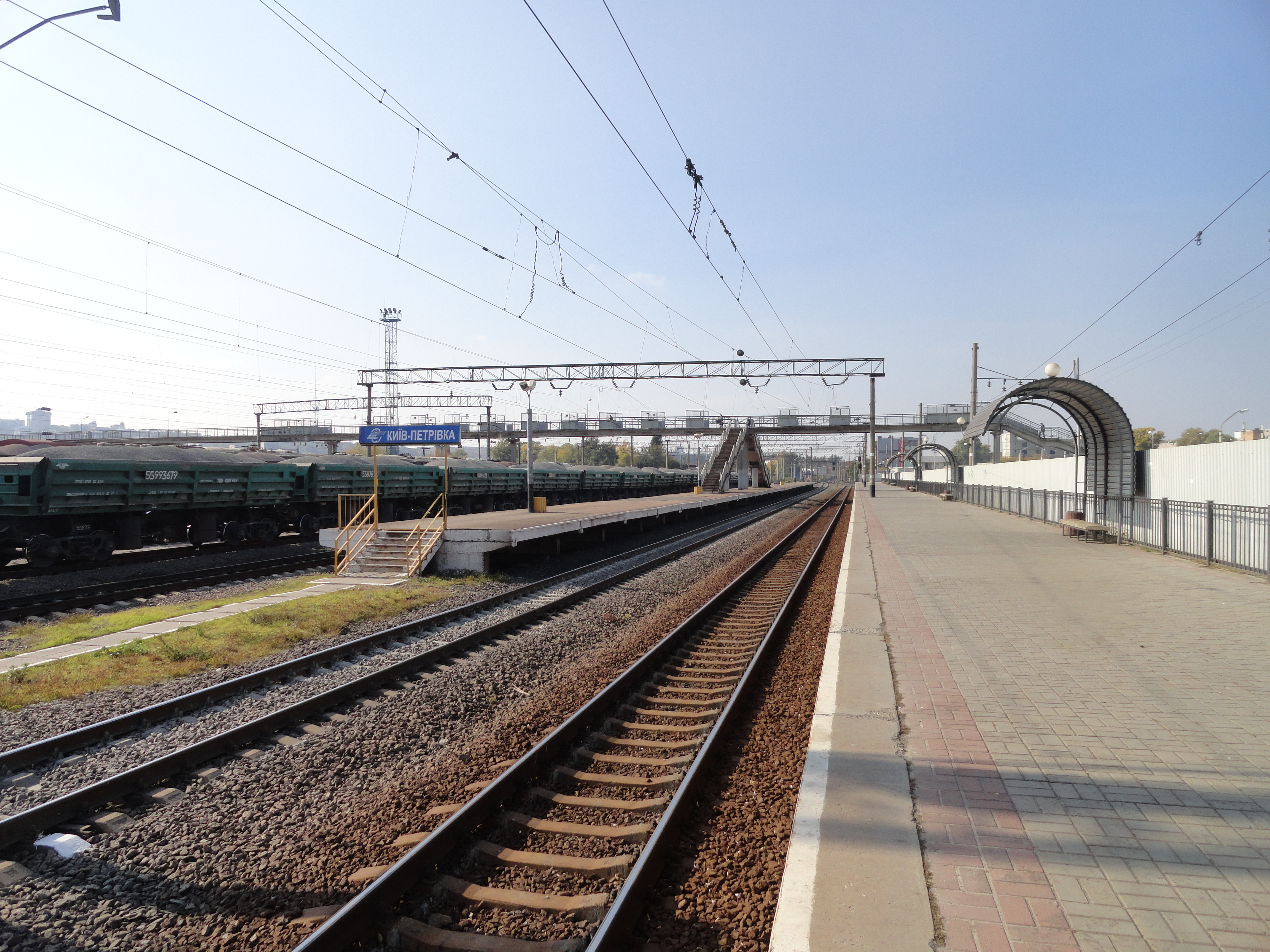 Залізнична станція Почайна. Київ, Україна